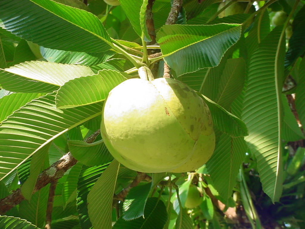 Dillenia indica, Flor de Abril. Fruto e Árvore.